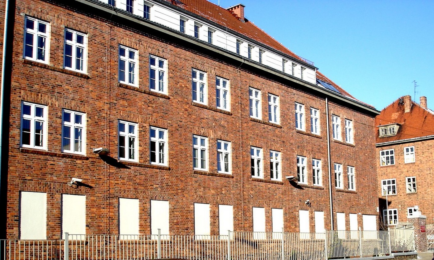 Dawne koszary w kompleksie przy ul Mickiewicza w Szczecinie